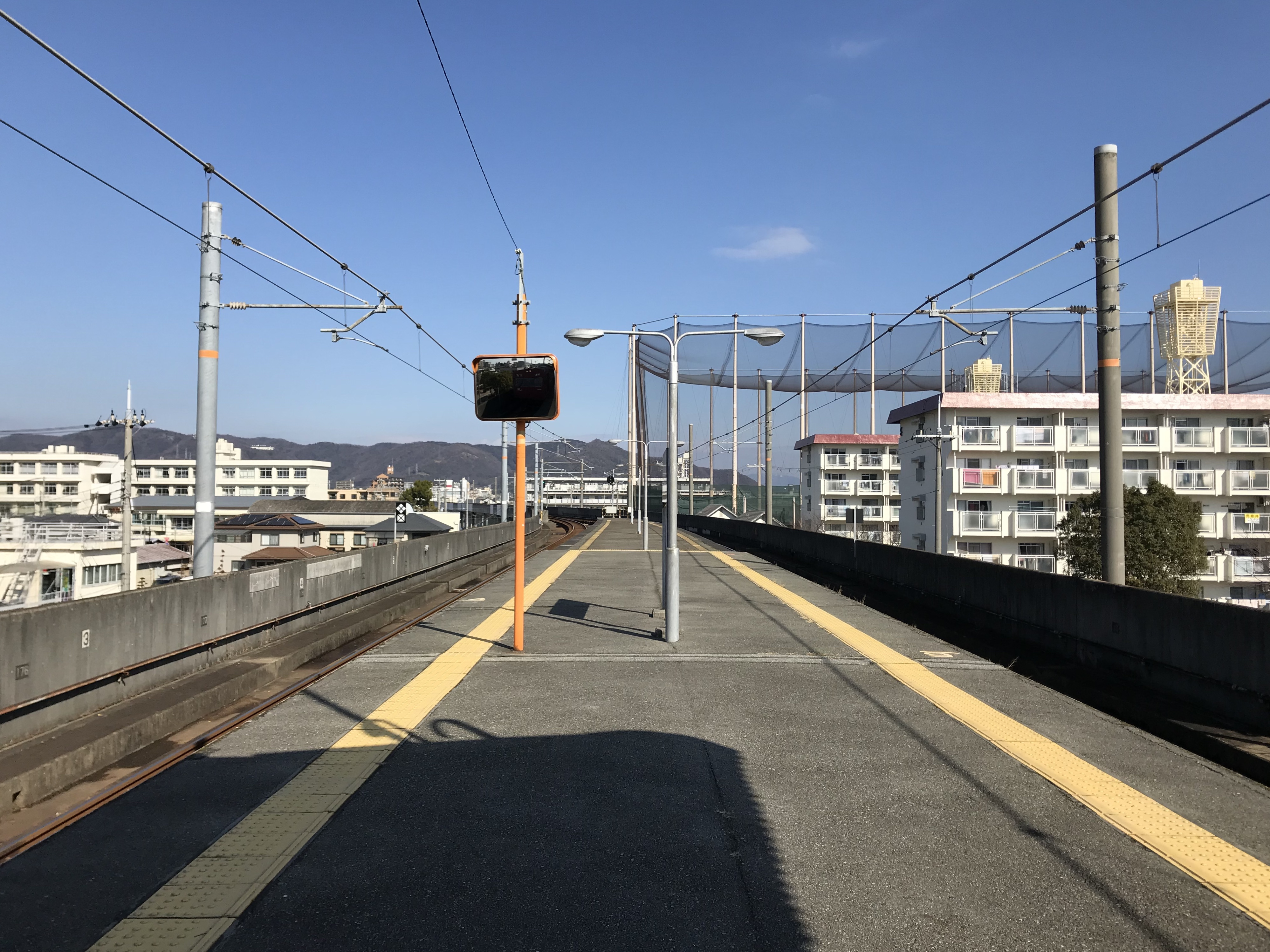 京口駅のホーム(奥は野里方面)